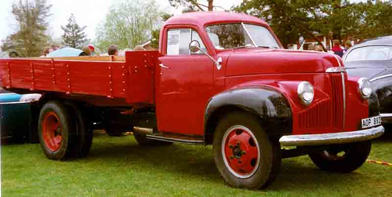 Studebaker M15A-52 Truck 1948